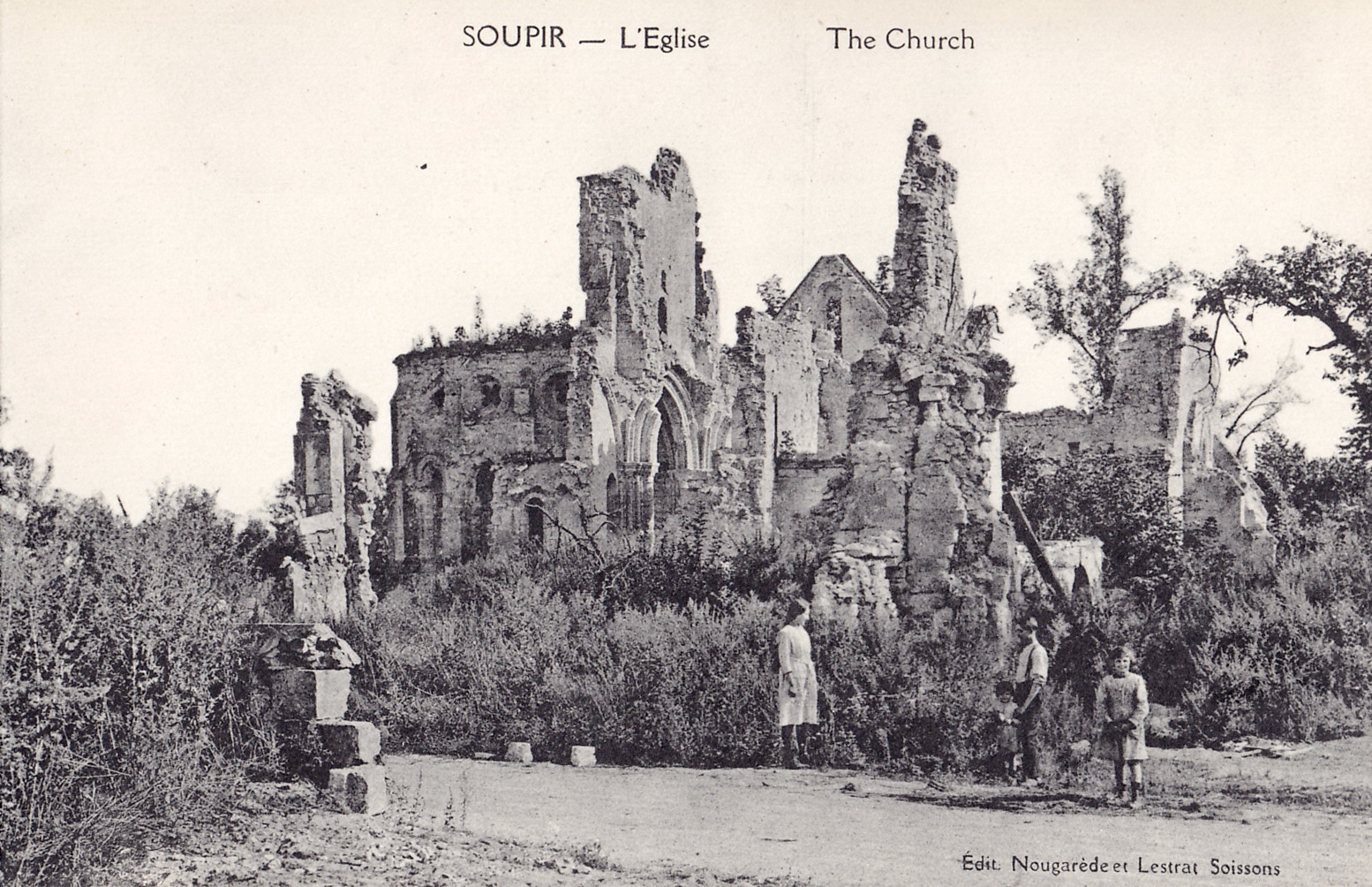 Carte postale ancienne éditée par B. Nougarède et H. Lestrat à Soissons :SOUPIR - L'Eglise